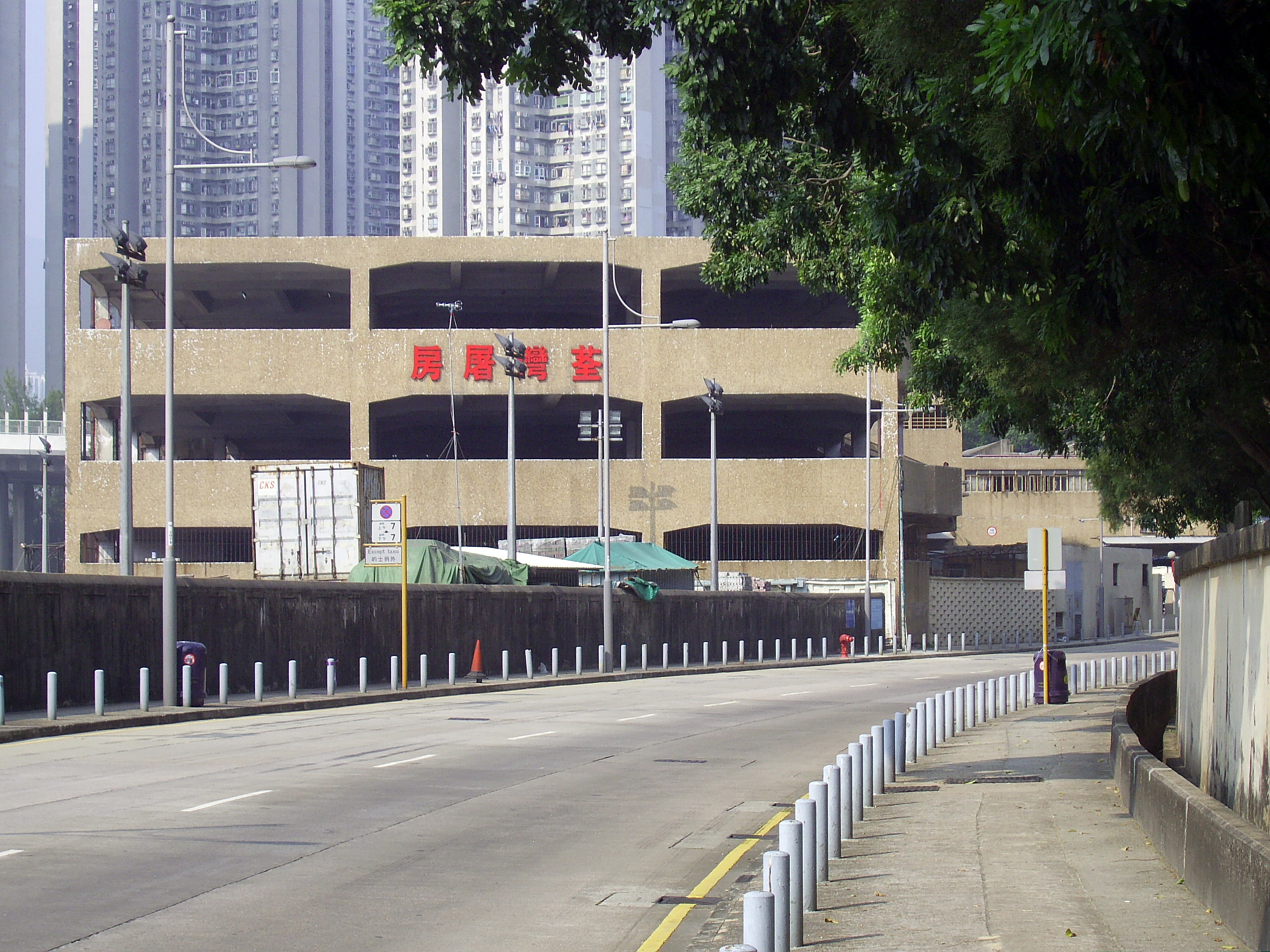 中文（香港）: 荃灣屠房